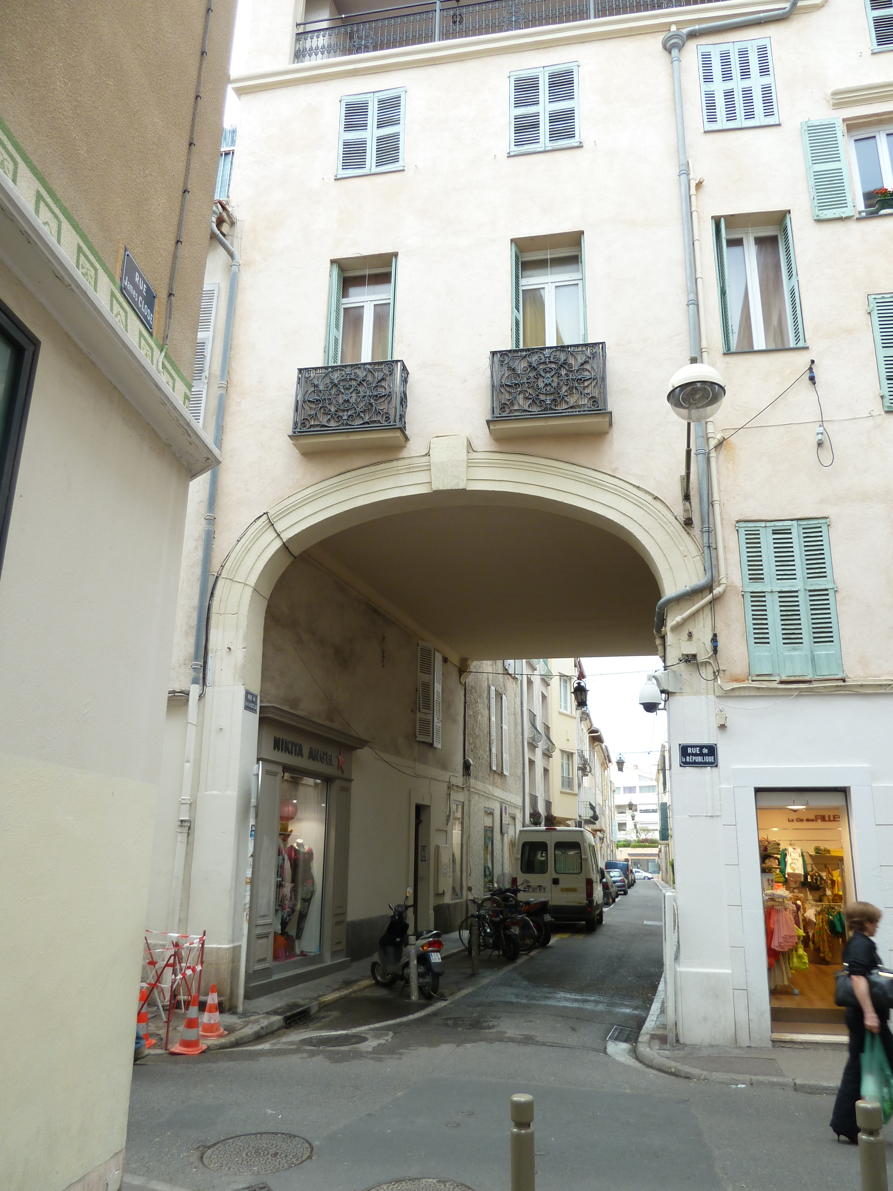 Arcade house rue dr roustan